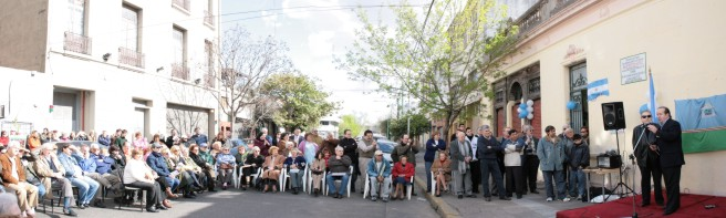 ConventilloPaloma:placaHonorVaccarezza